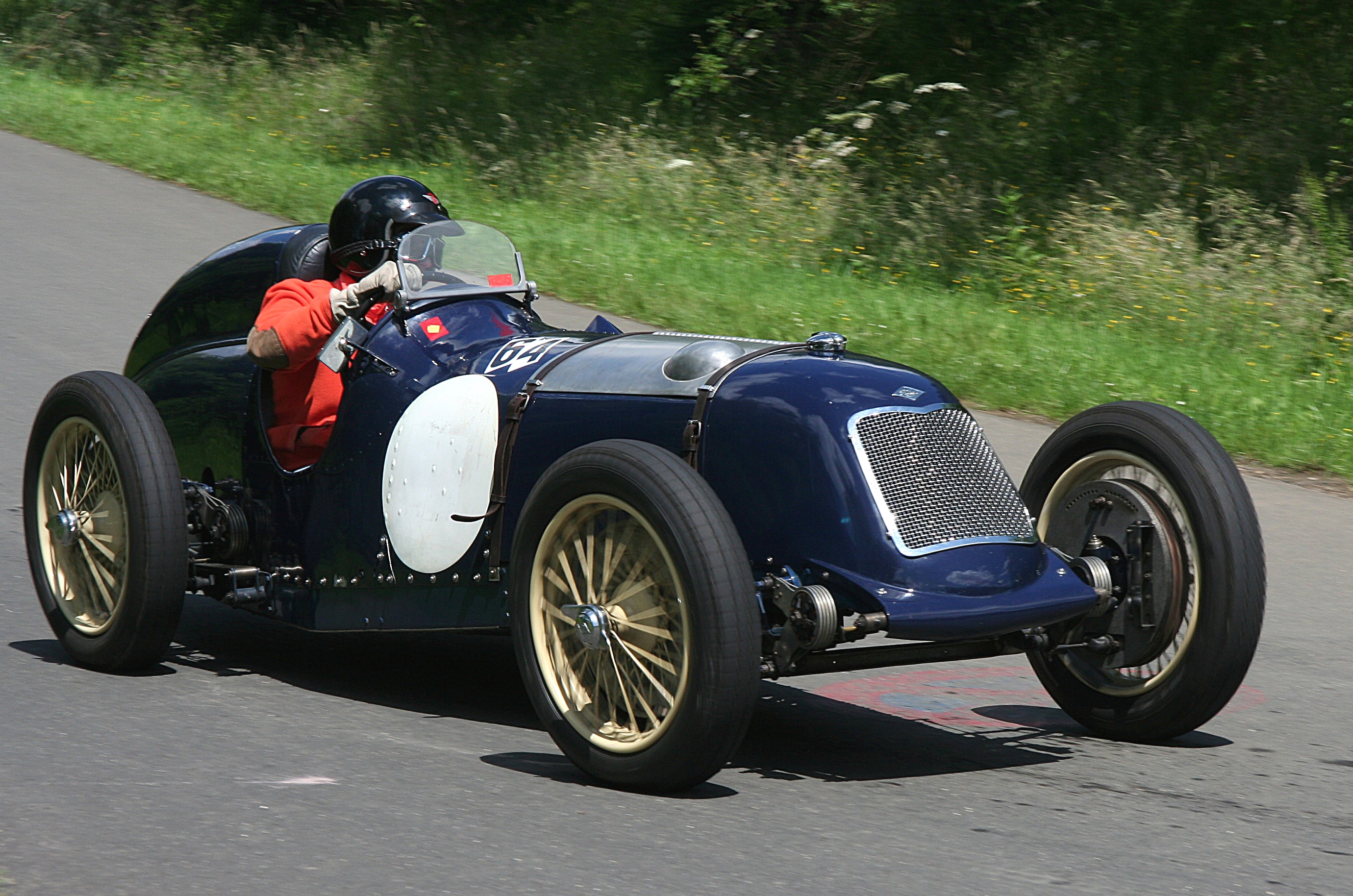 Riley T Sprite, 1996 cm³, Baujahr 1936, beim Oldtimer Festival des DAMC 05 auf dem noch vorhandenen Streckenabschnitt der einstigen Südschleife des Nürburgrings